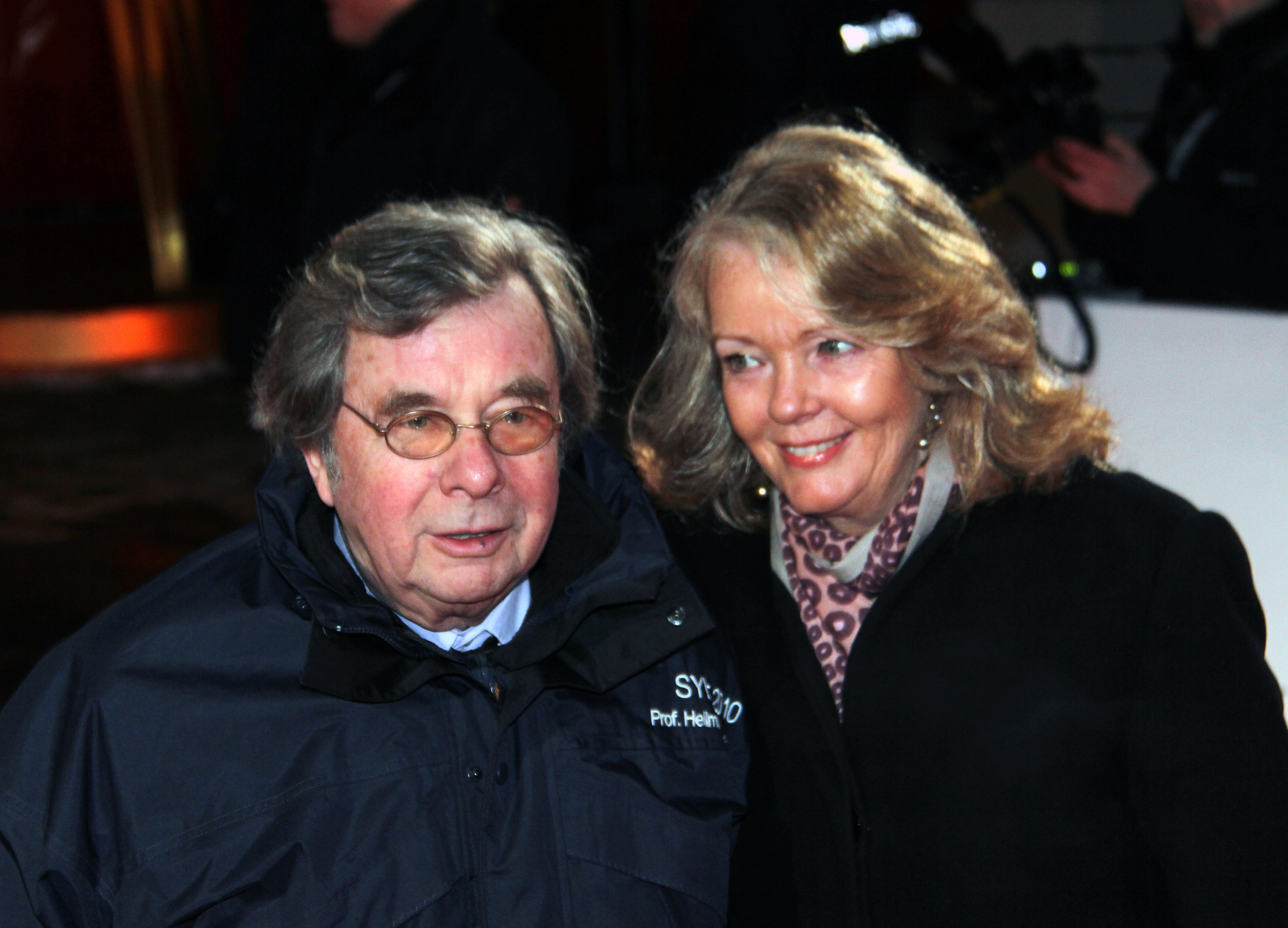 Hellmuth Karasek und Ehefrau Armgard bei der Goldenen Kamera 2012